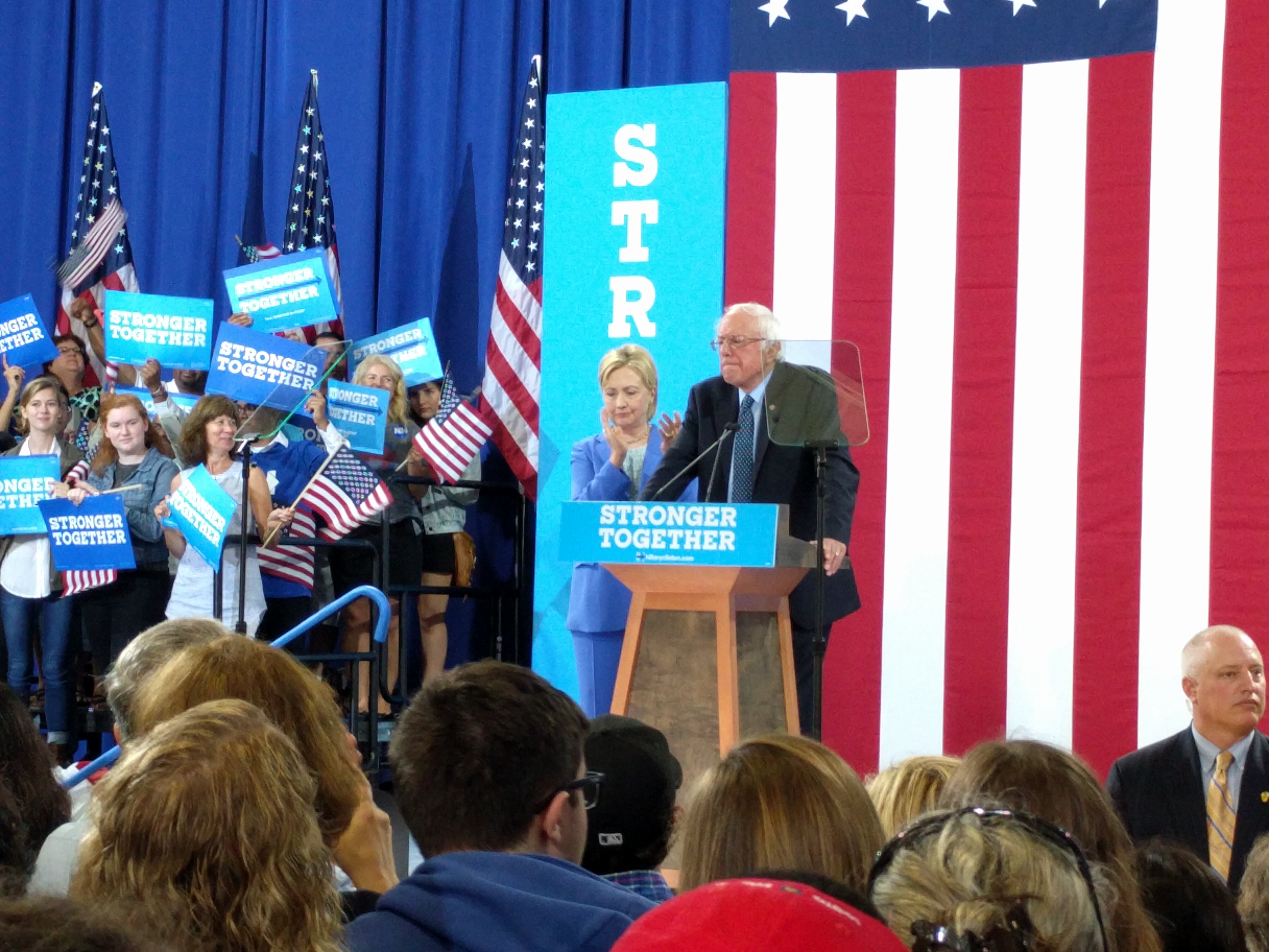 IMG_20160712_115126